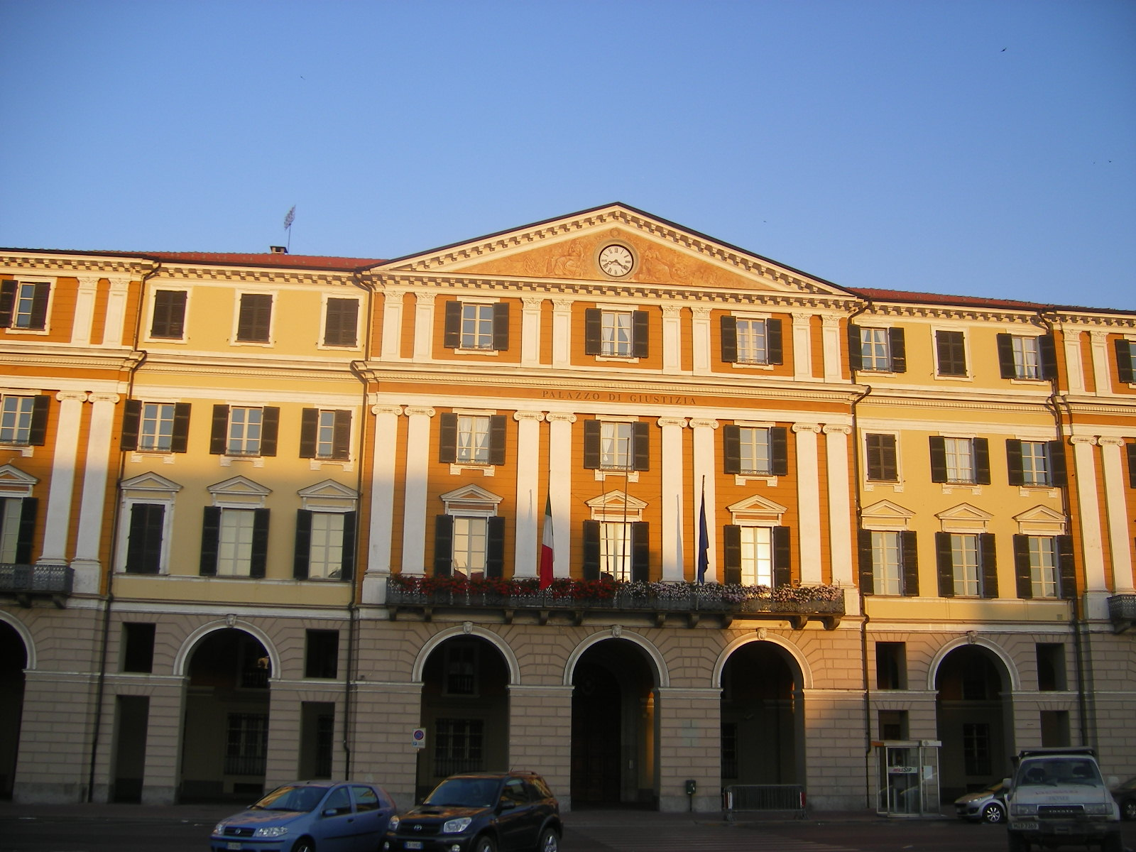 Cuneo